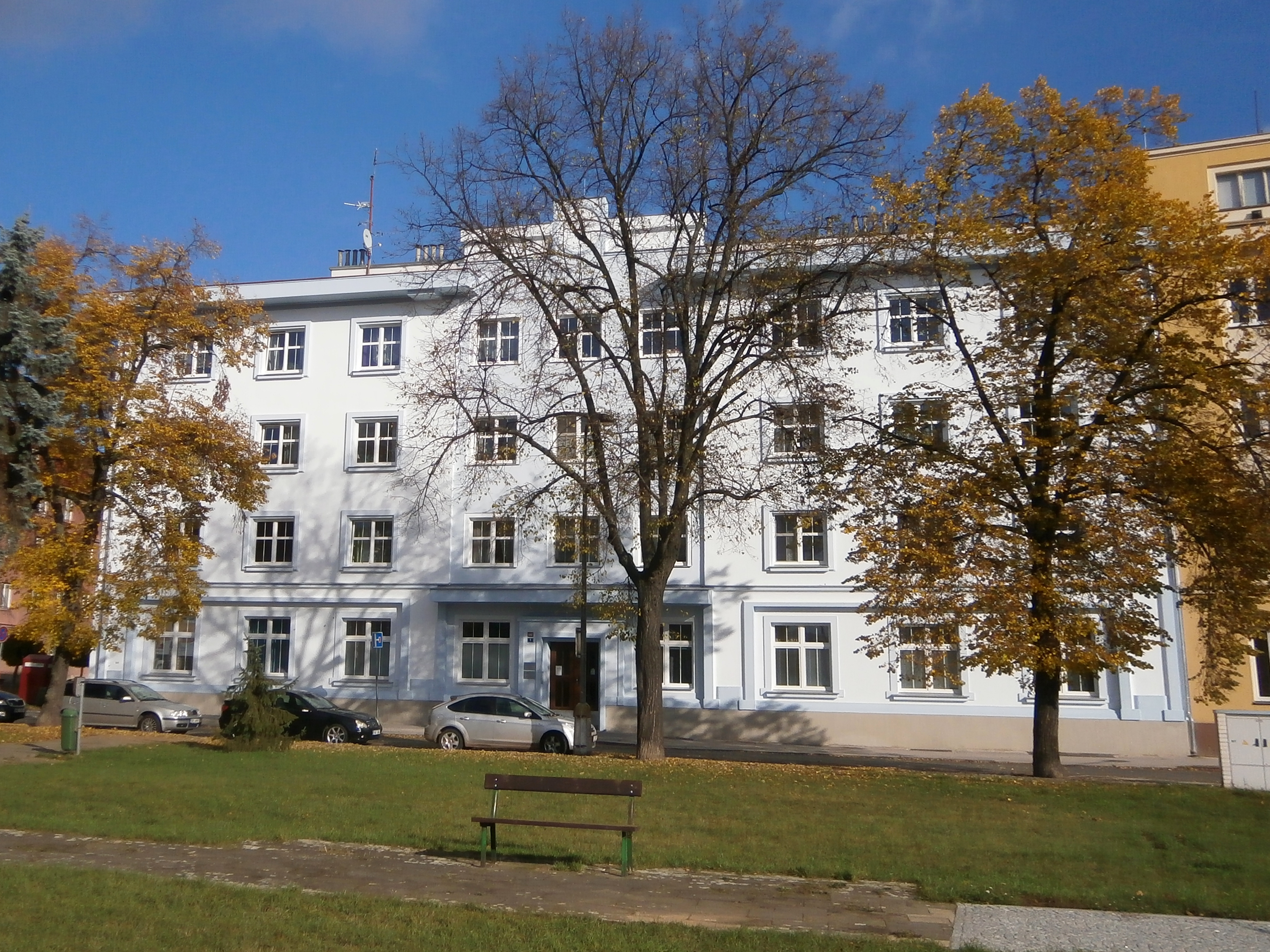 Bývalá radnice Pražského Předměstí